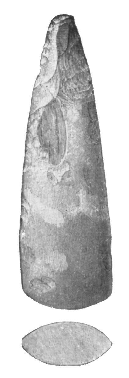 Spetsnackig yxa av flinta, funnen i Skåne